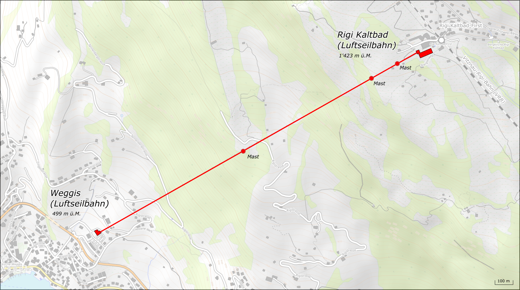 Detaillagekarte der Luftseilbahn Weggis-Rigi Kaltbad